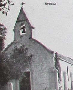 Église de Kelibia en Tunisie